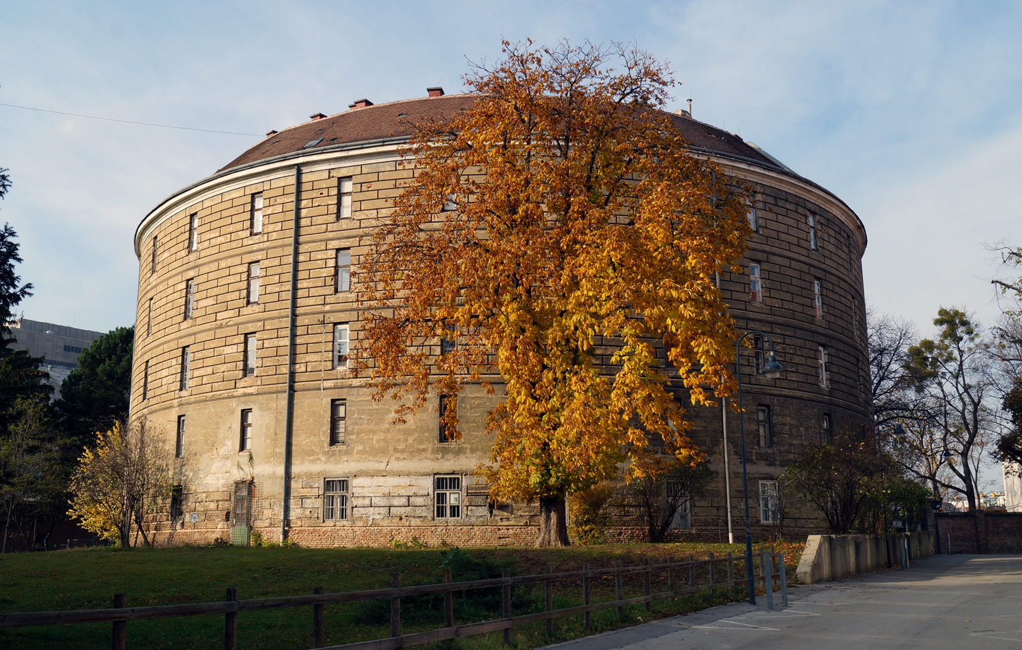 Außenansicht Narrenturm, 2012